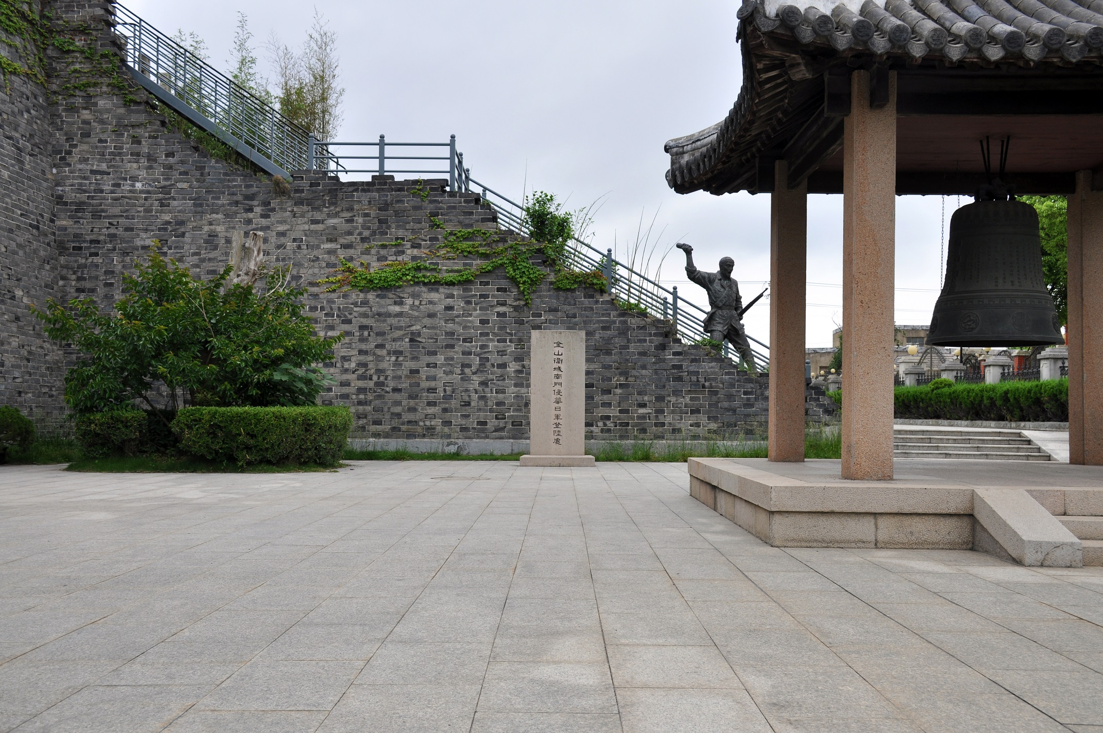 侵华日军金山卫城登陆地点(金山县金山卫城老南门) 石化街道南安路87号(近学府路) 1937年